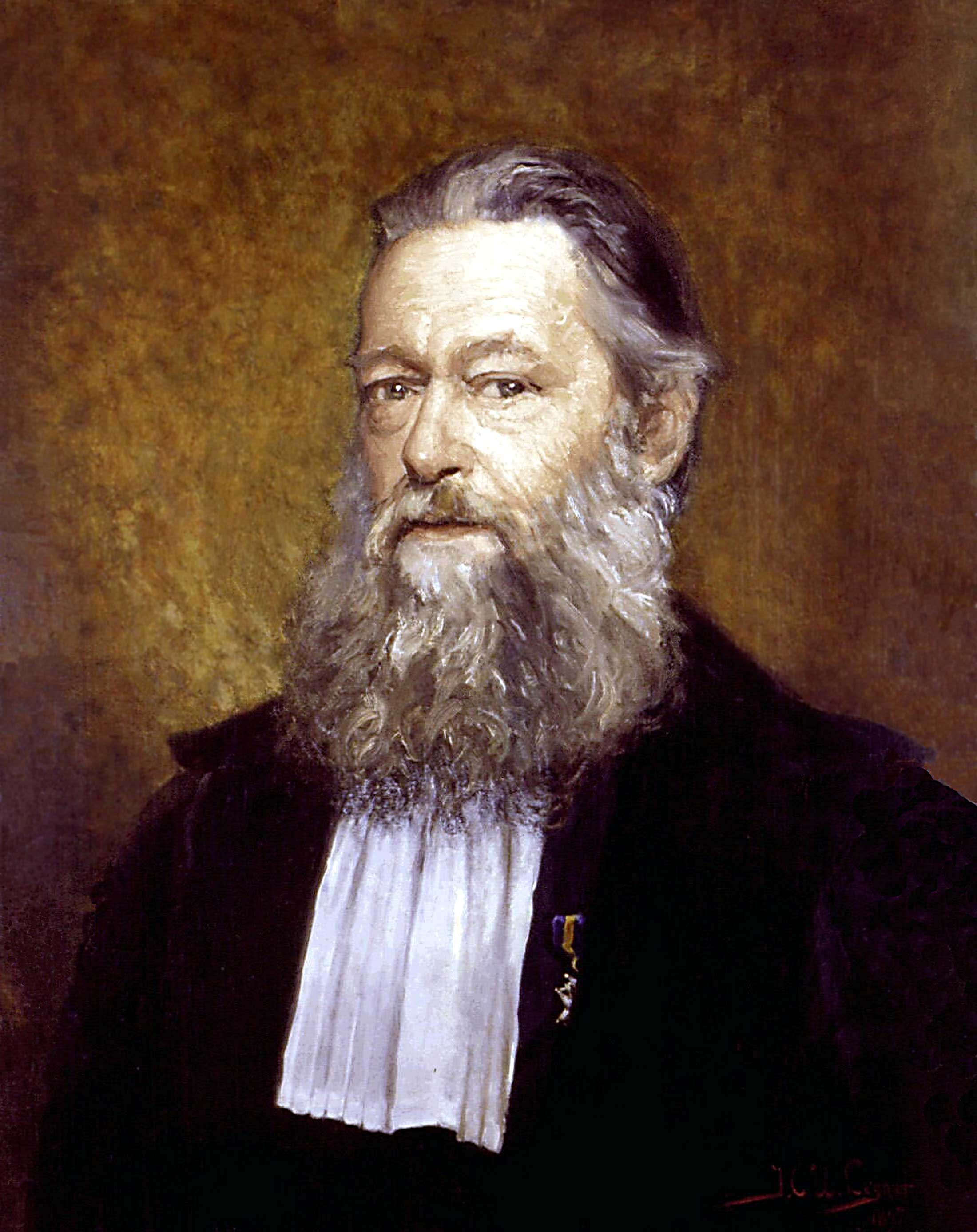 Henrik van Herwerden (1821-1910) niederländischer Philologe